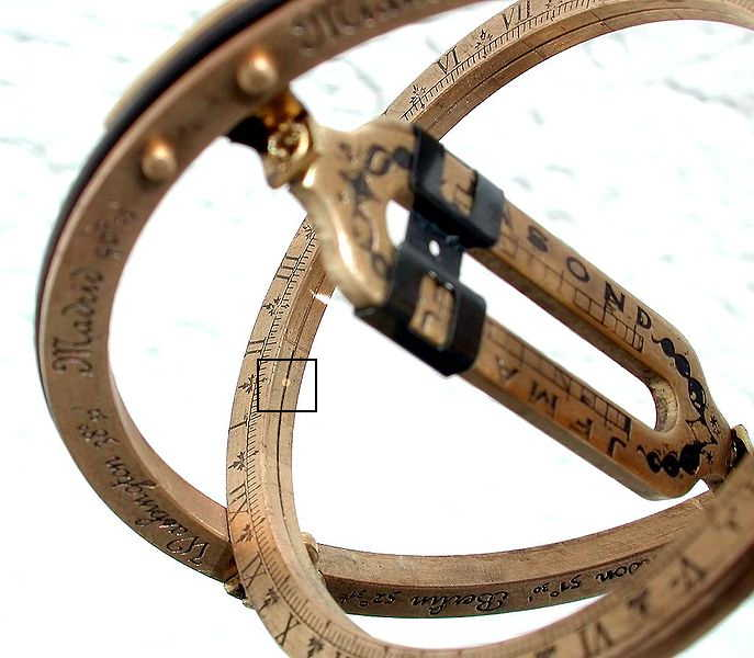 tragbare Ringsonnenuhr, anzeigender Lichtfleck markiert